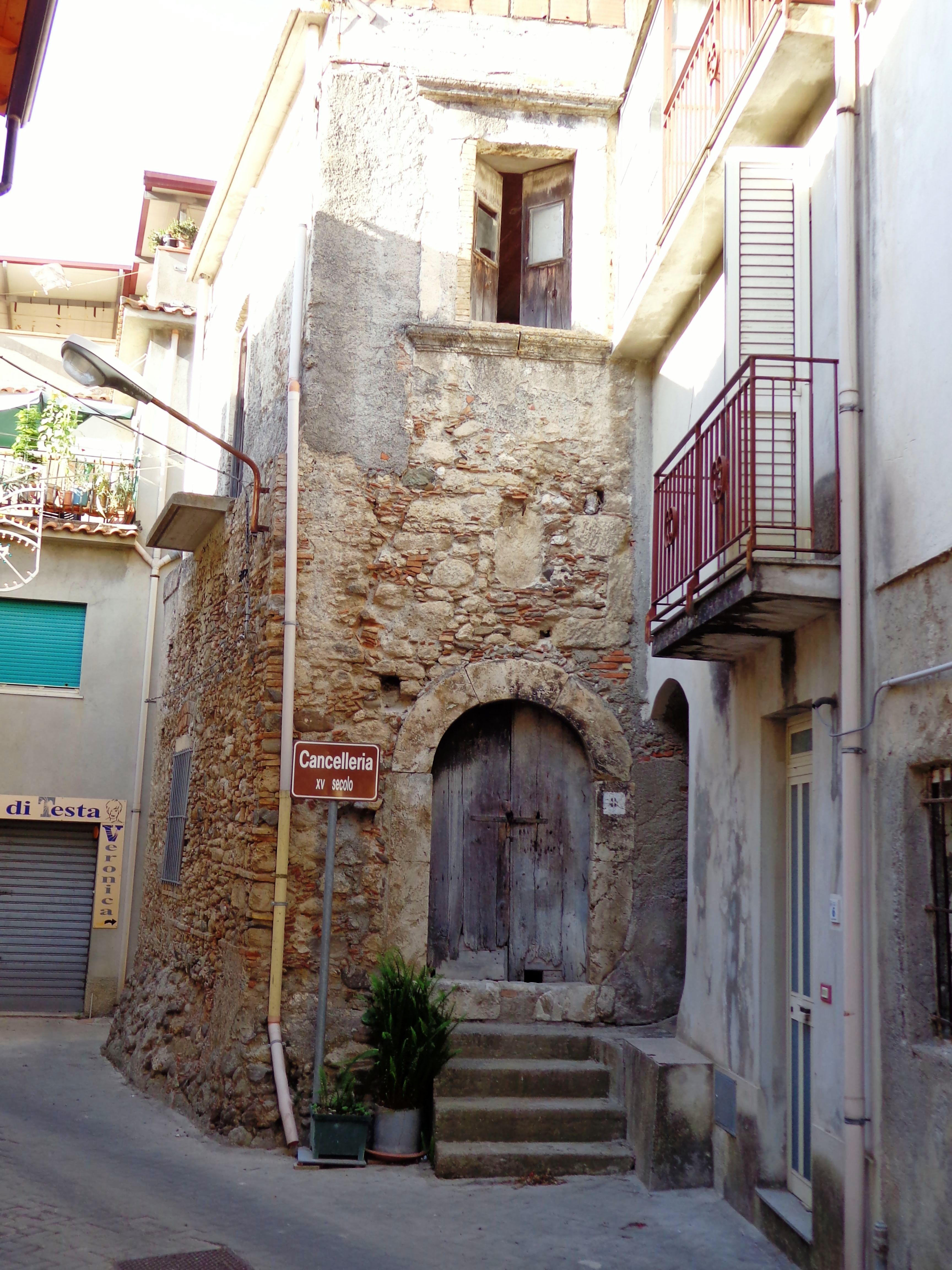 Condrò Cancelleria